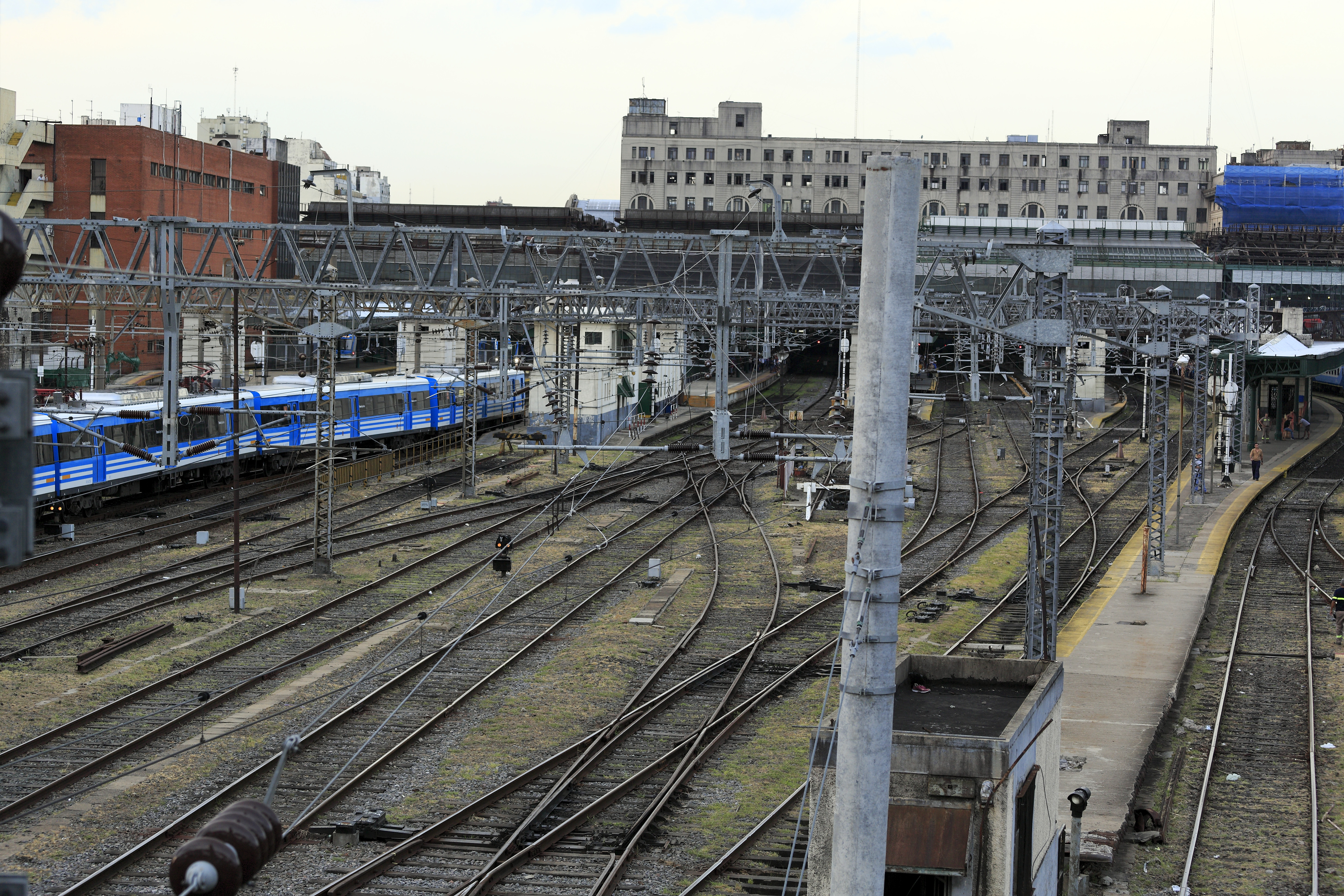 Von der Brücke der Calle Ituzaingó, das Gleis 13 ganz rechts ist das erste Fernbahngleis ohne Fahrleitung.